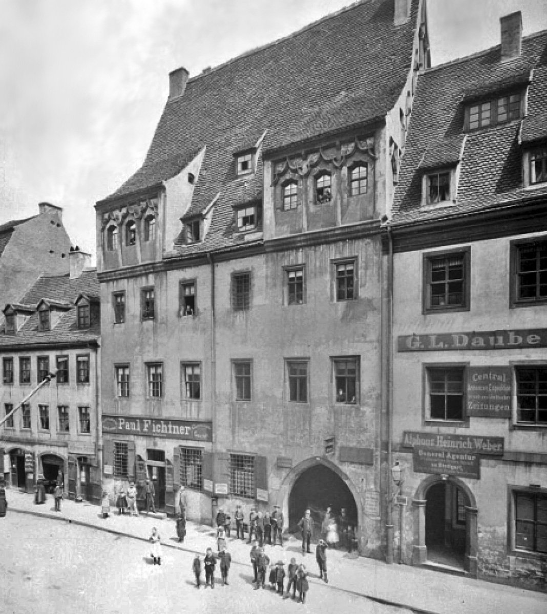 Das Rote Kolleg der Universität Leipzig in der Ritterstraße um 1880